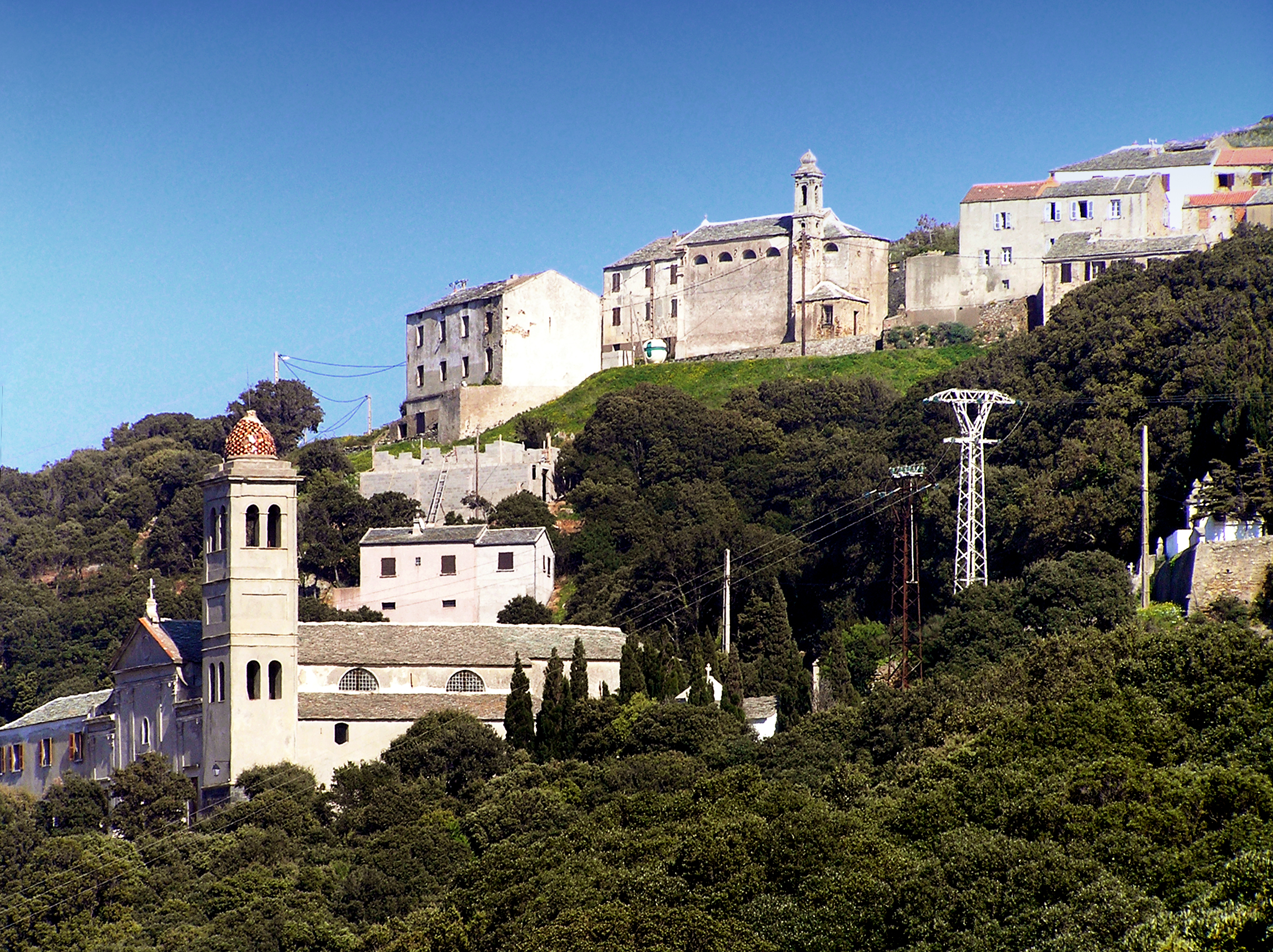 Ersa (Corsica) - Botticella, la chapelle San Giovanni-Battista et l'ancien couvent Santa Maria Nativita